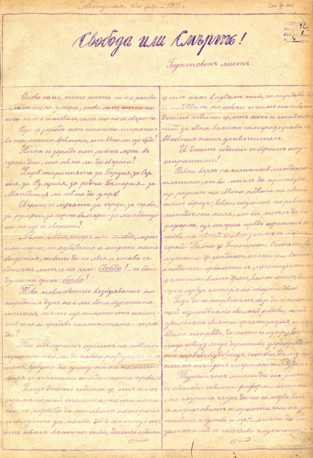 Брой на вестник "Свобода или смърт" на Пейо Яворов от 10 февруари 1903 година.